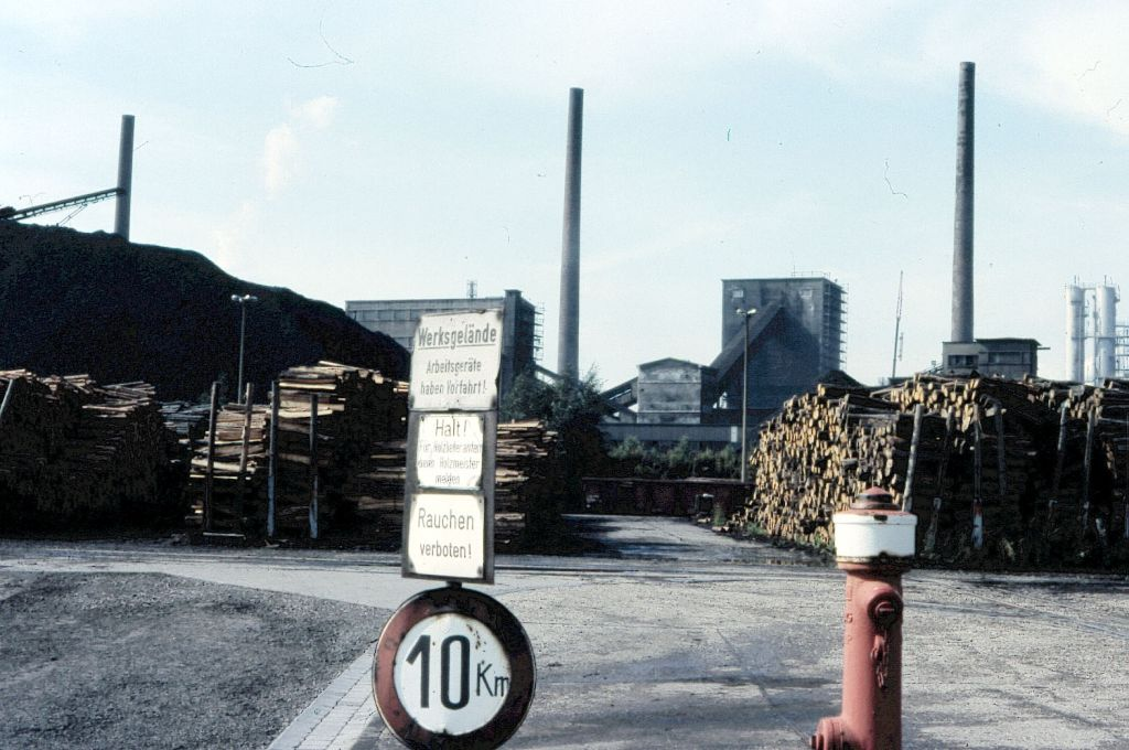 Holzplatz der Zeche Gneisenau in den 1980er jahren eigenes Foto